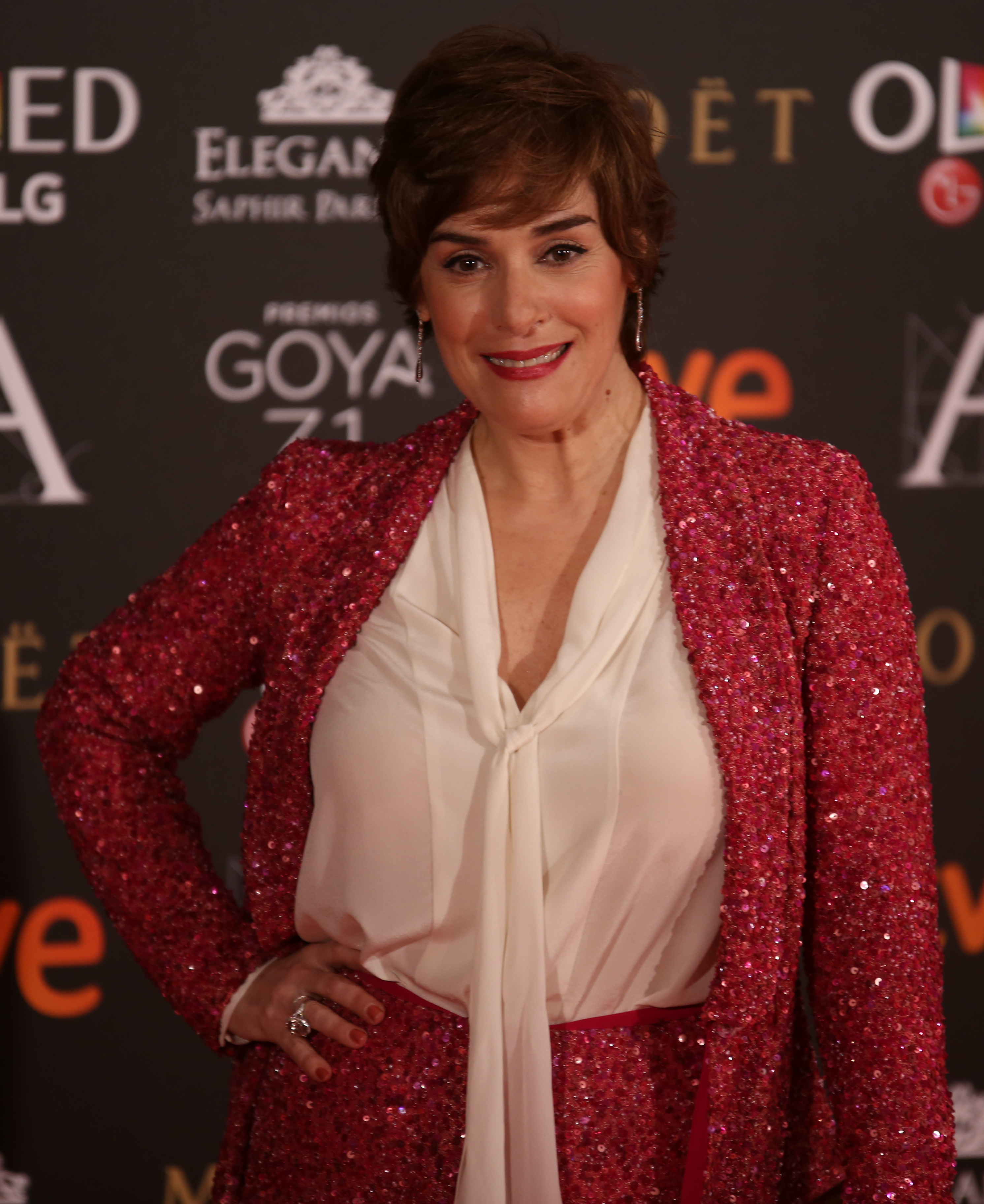 Premios Goya 2017